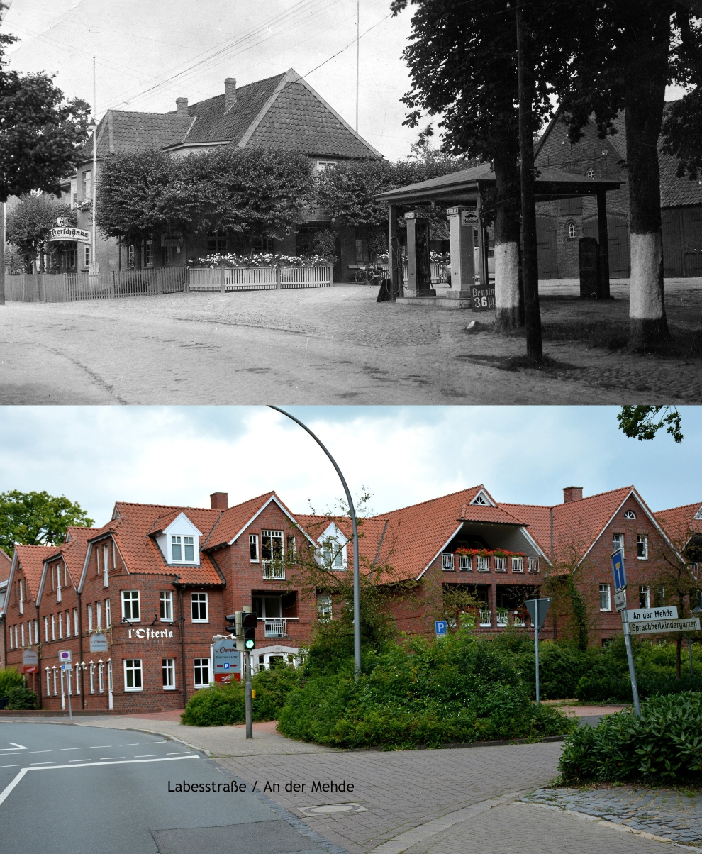 Labesstraße - An der Mehde in Zeven